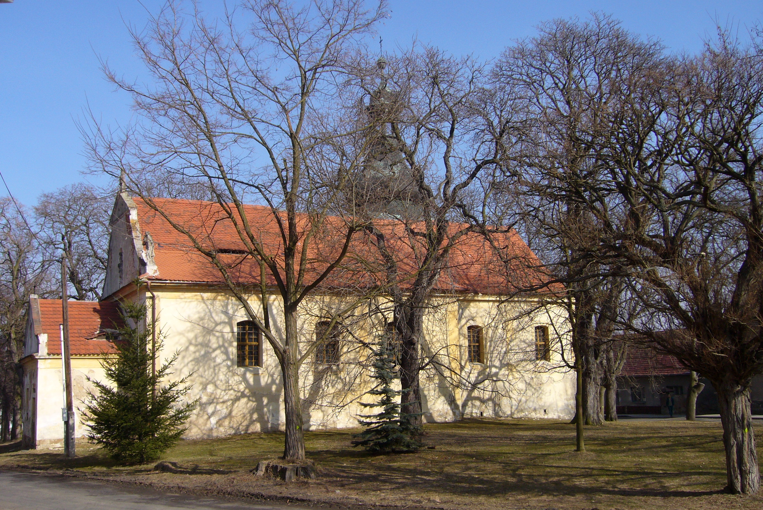 Kostel svatého Jakuba Většího od Jihu, náves, Oráčov.